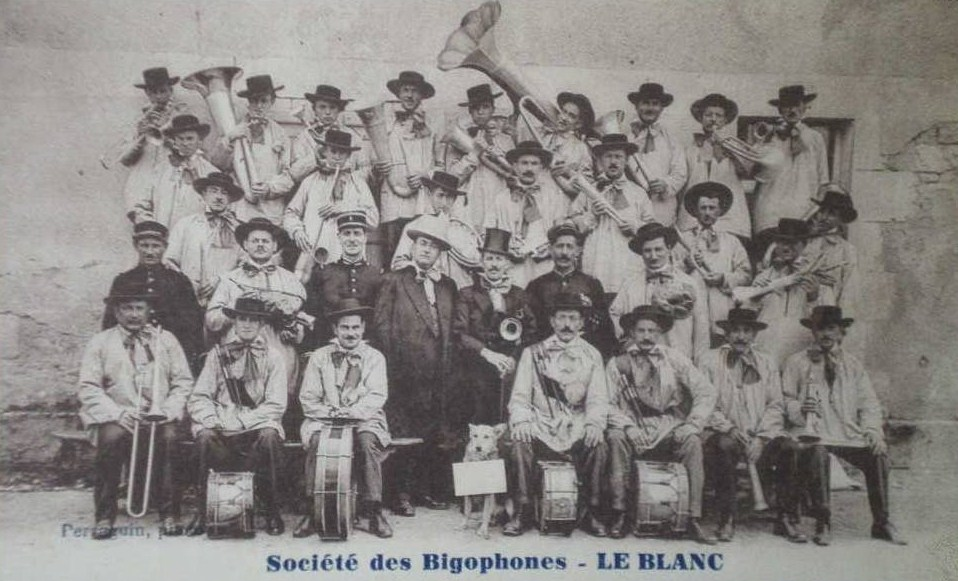 La Société de Bigophones de Le Blanc (Indre).